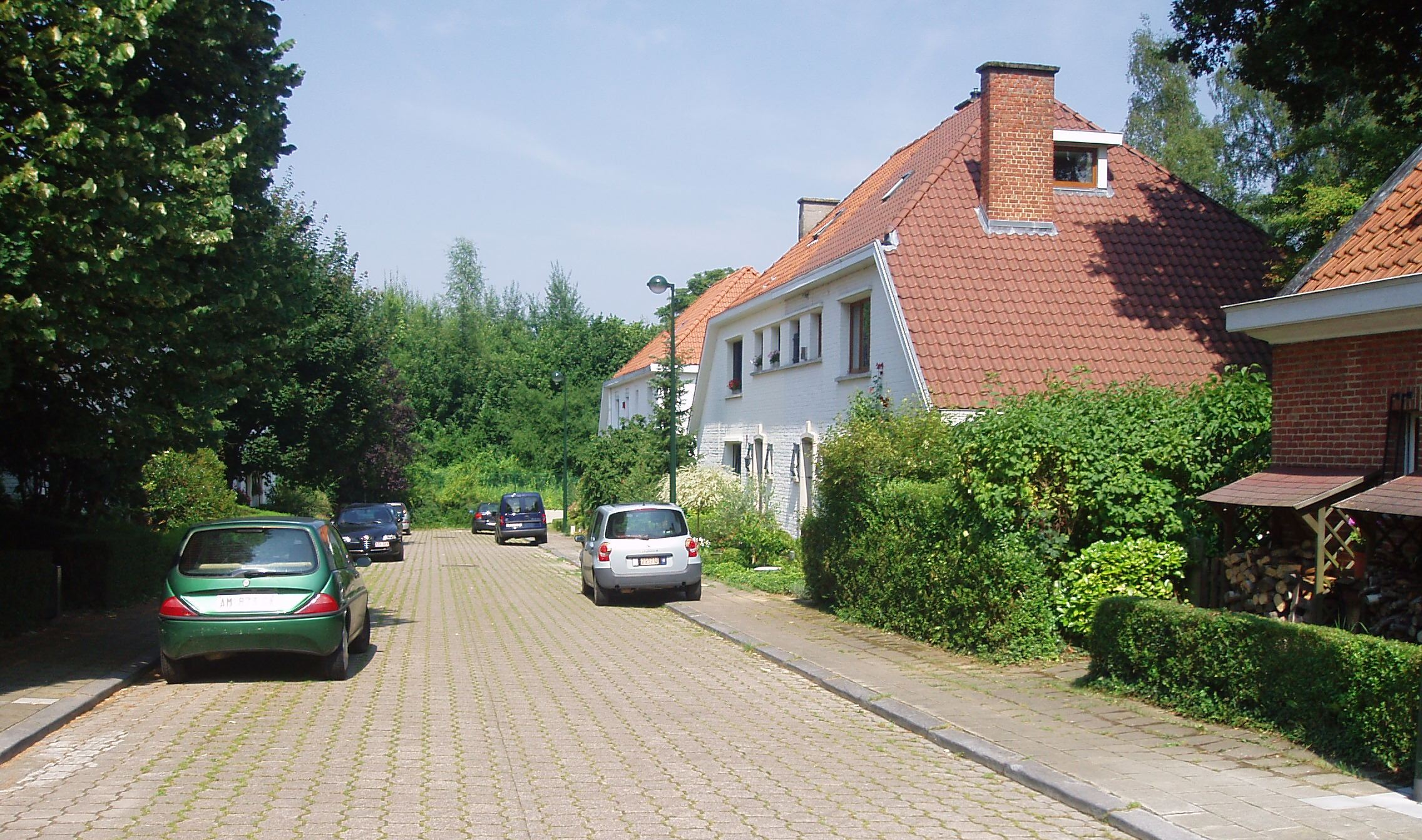 rue Henri Simons Auderghem Belgium